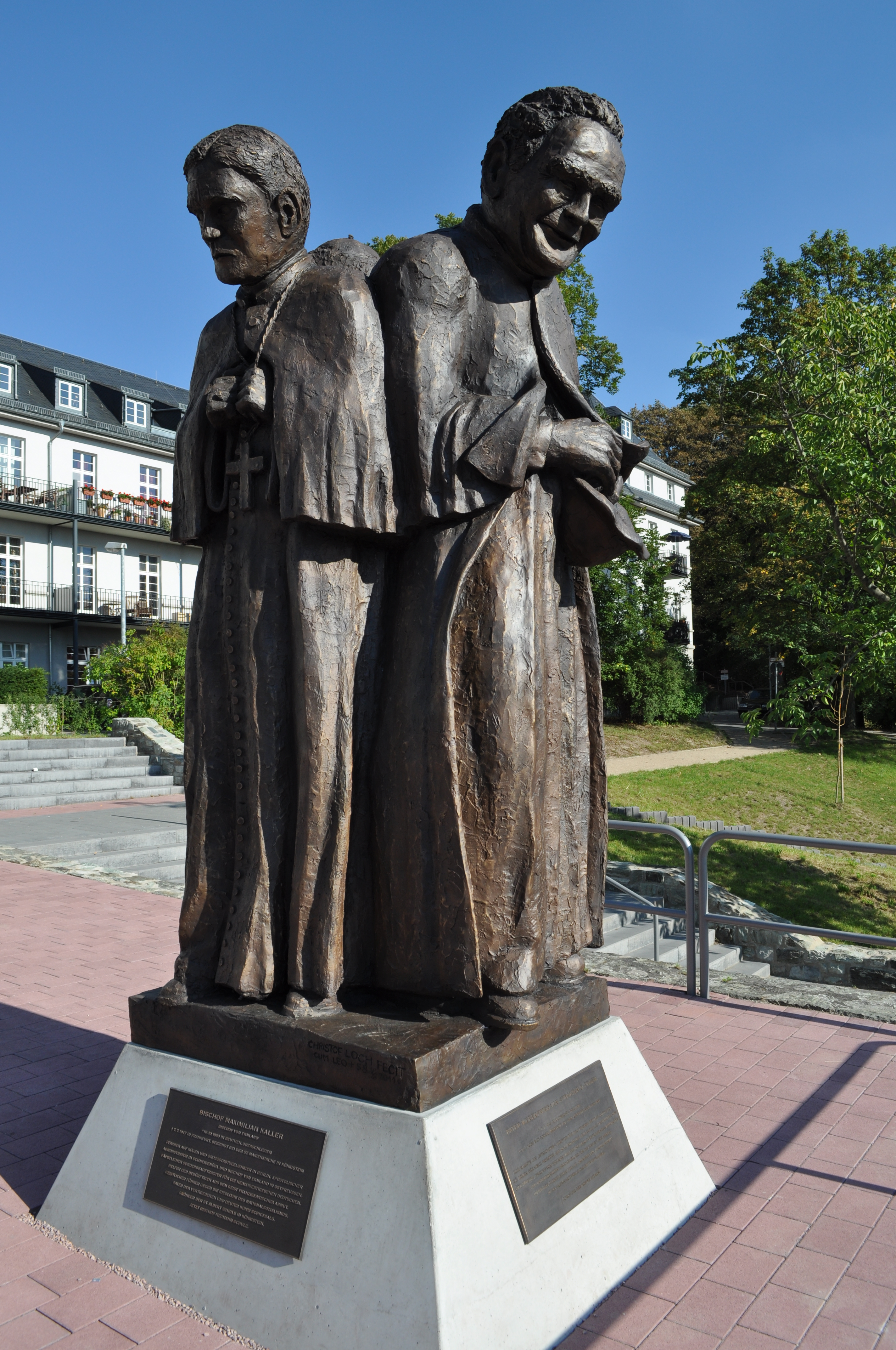 Denkmal für die Königsteiner Kirchenväter in Königstein im Taunus. Das Denkmal wurde von Christoph Loch entworfen und am 1. September 2011 eingeweiht. Das Bild zeigt die Figur von Maximilian Kaller und Pater Werenfried